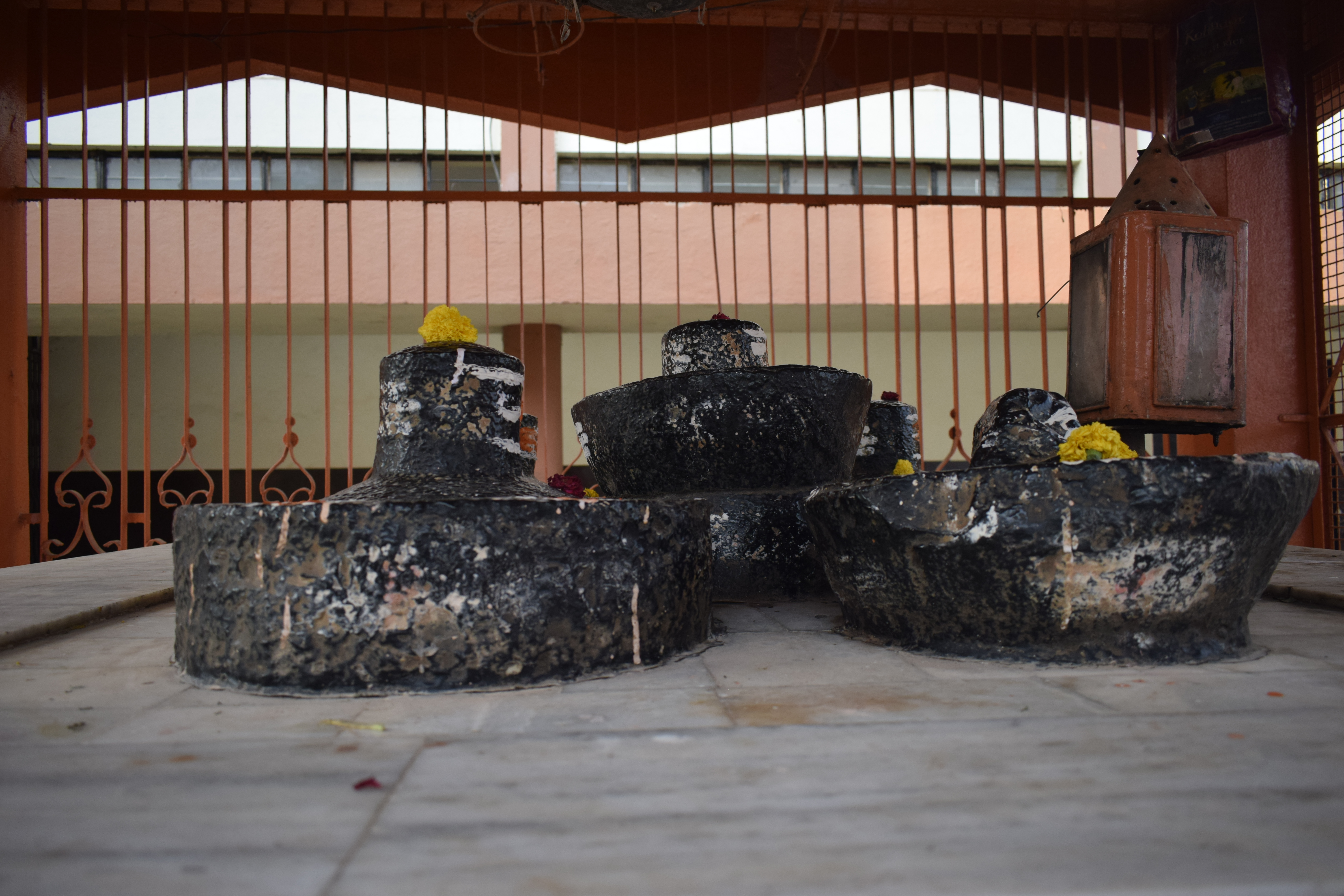 श्री बालब्रह्मेश्वर लिंग